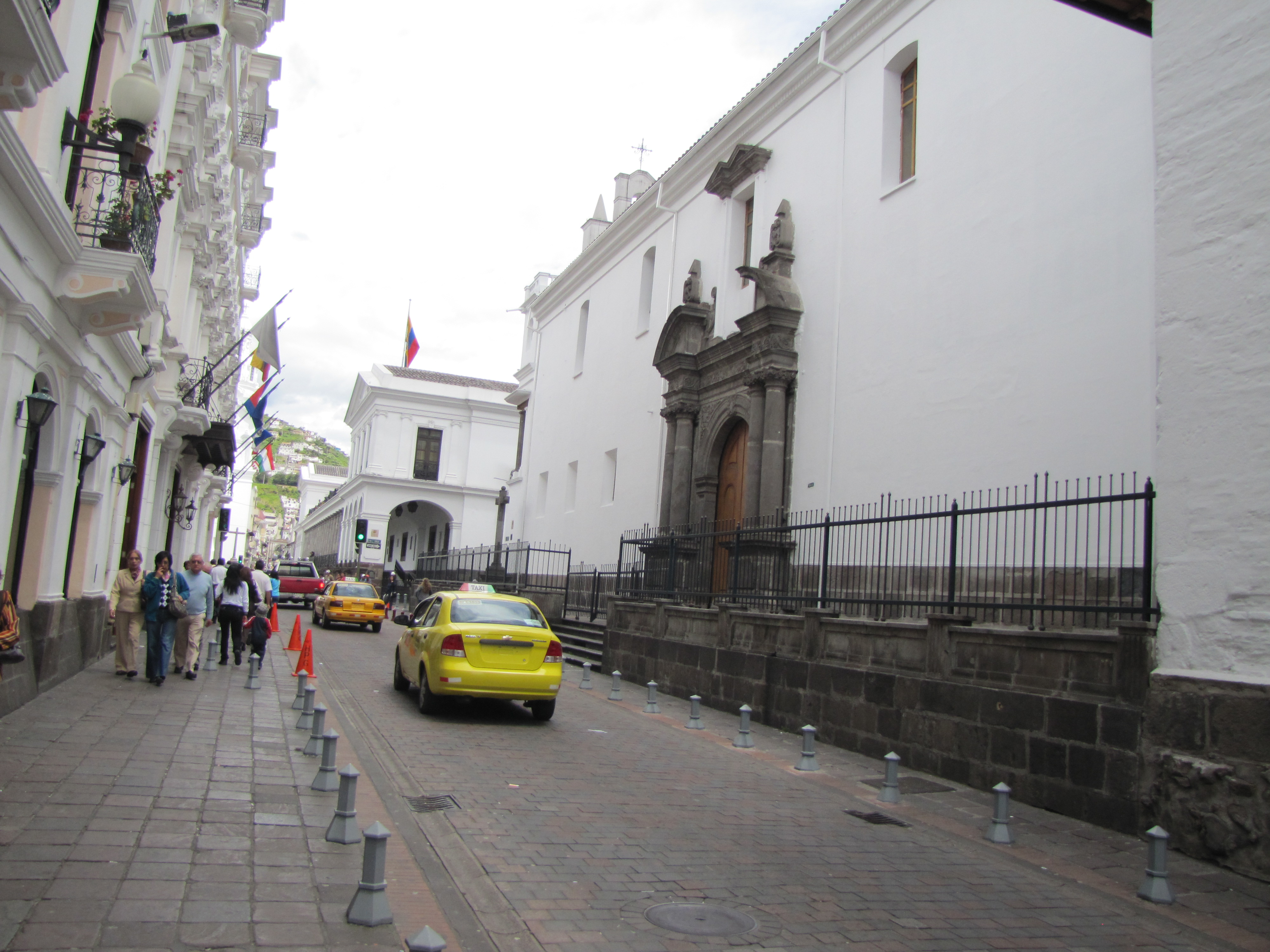 Quito, Ecuador